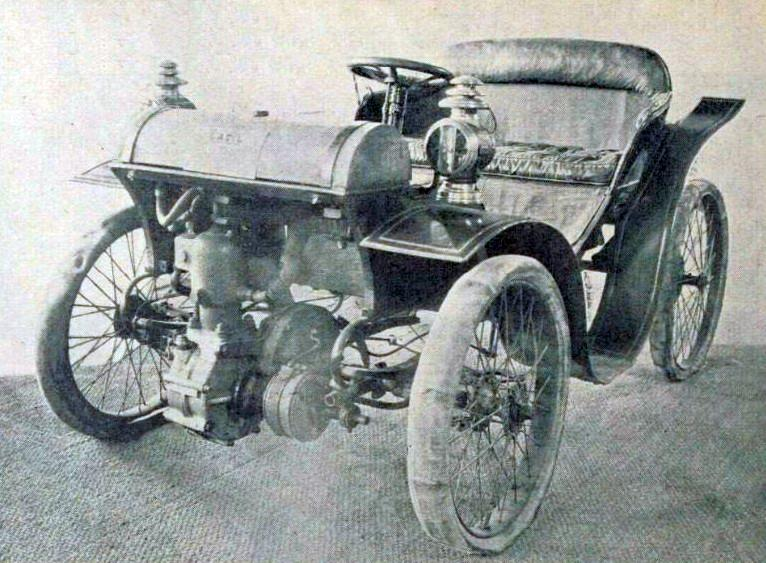 Voiture Latil de 1899, à traction avant et moteur transversal. Freins aux quatre roues.